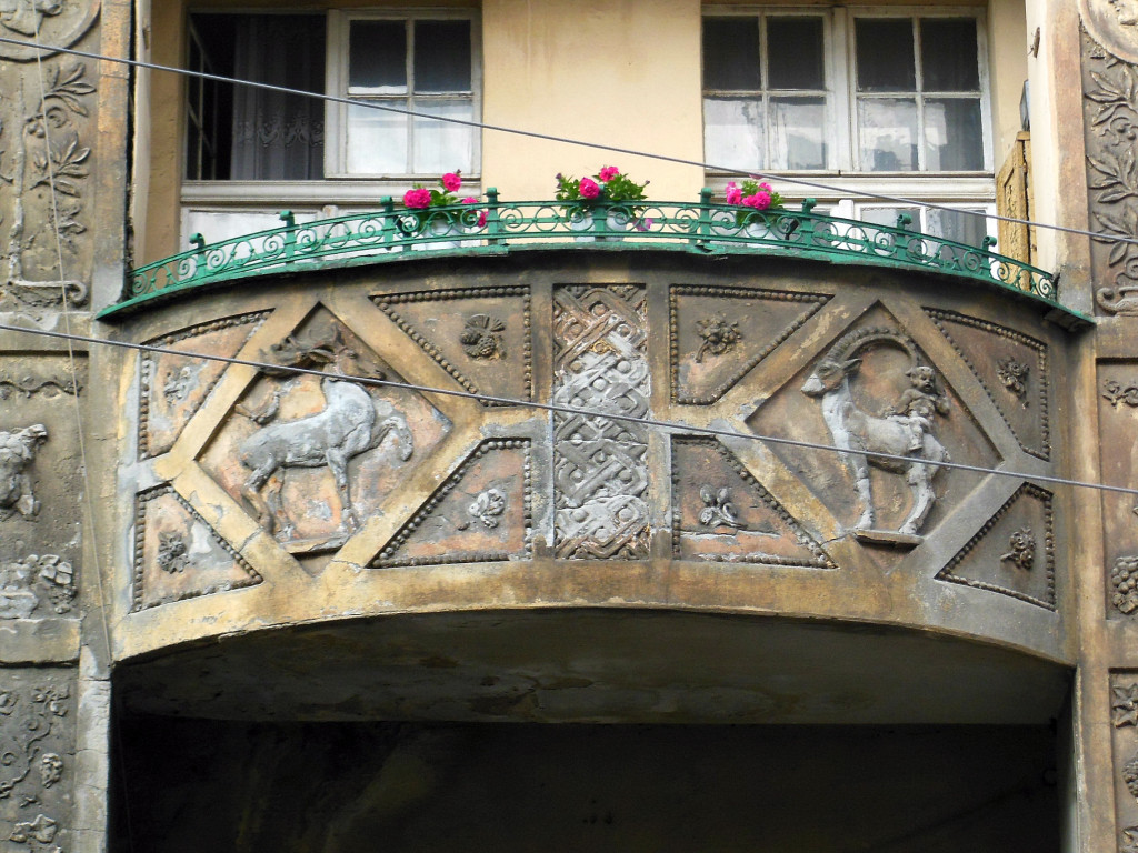 Kamienica przy ul. Dworcowej 67 w Bydgoszczy (1912-1913, aut. Otto Walther)